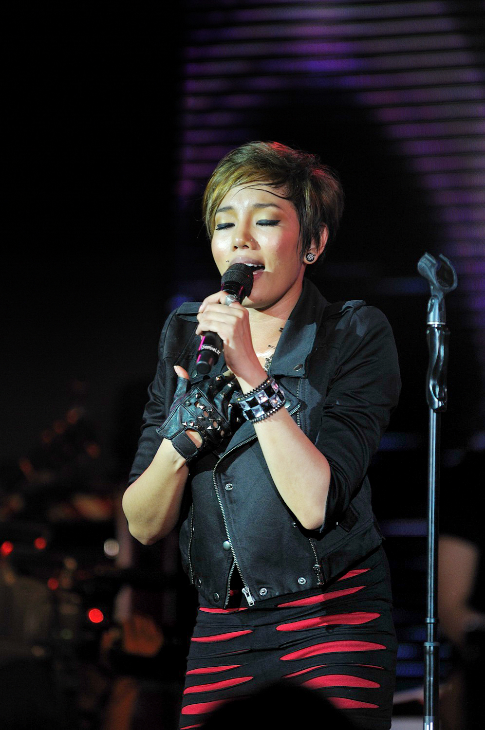 Da Endorphine, mini concert à Future Park, Rangsit, Thaïlande. Le 02 Octobre 2010.